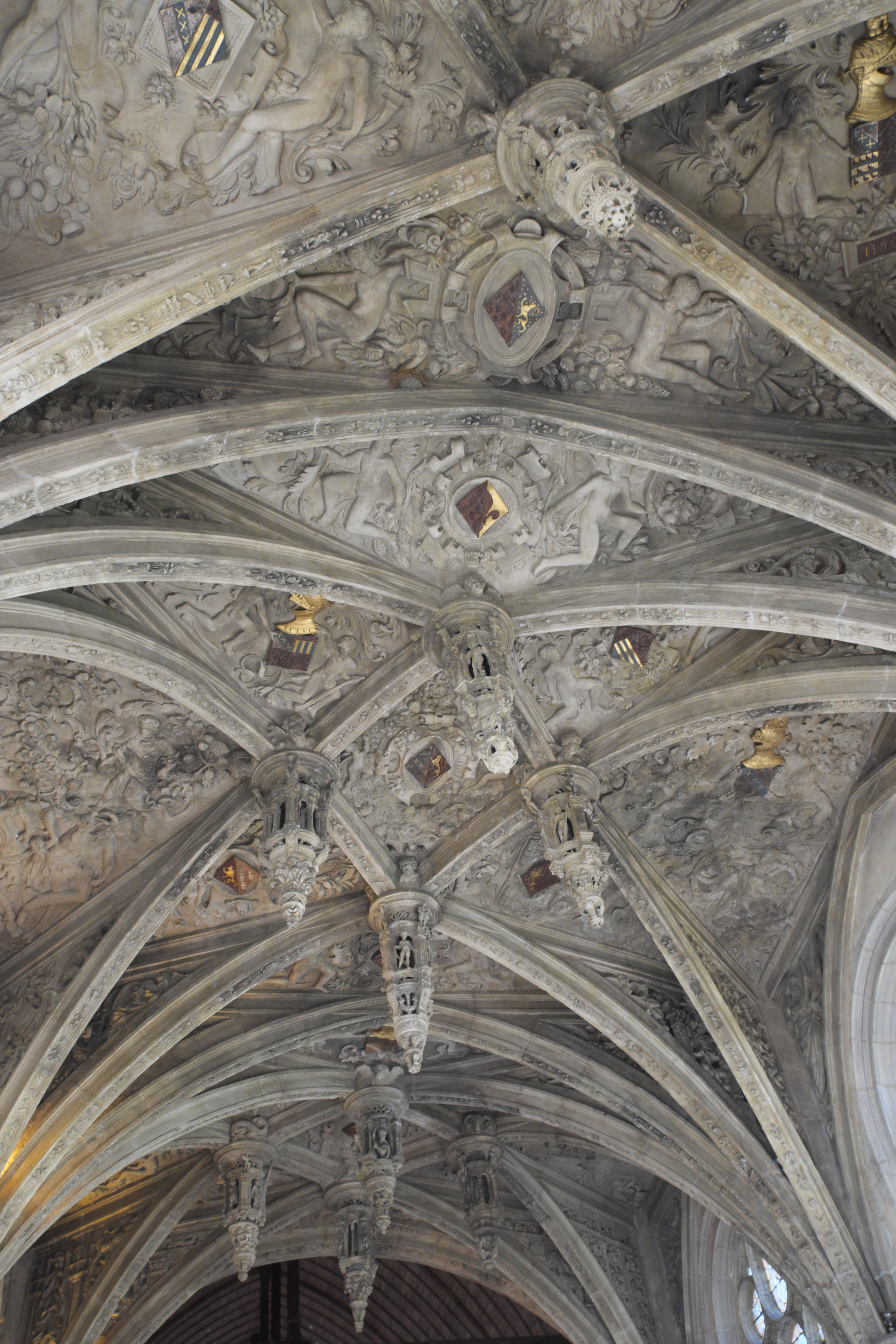 Katholische Kirche Saint-Hilaire in Tillières-sur-Avre im Département Eure (Region Normandie/Frankreich), Gewölbe mit Schlusssteinen aus dem 16. Jahrhundert